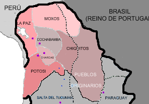 mapa del alto peru 1783